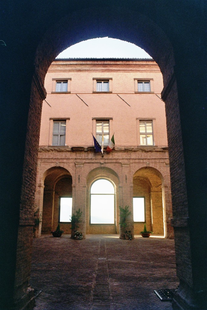 Il Palazzo Arcivescovile, a portici, di forme rinascimentali, è stato eretto nel secondo Cinquecento. All'interno è ospitato il Museo Diocesano, comprende una notevole raccolta di dipinti, sculture, argenterie, ceramiche e arredi sacri, provenienti dalle chiese del territorio: vi si possono ammirare una preziosa, grande tela di Gianbattista Tiepolo (1740) raffigurante la Madonna in gloria col Bambino e San Filippo Neri; il Trittico, su tavola, di Girolamo di Giovanni: Crocifisso, Addolorata e San Giovanni Evangelista, ai lati, Arcangelo Michele e San Giovanni Battista; il San Sebastiano del Boccati (1446); l'Annunciazione del Signorelli.